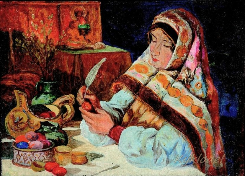 Клавдий Васильевич Лебедев (1852-1916). «Перед Пасхой», 1916